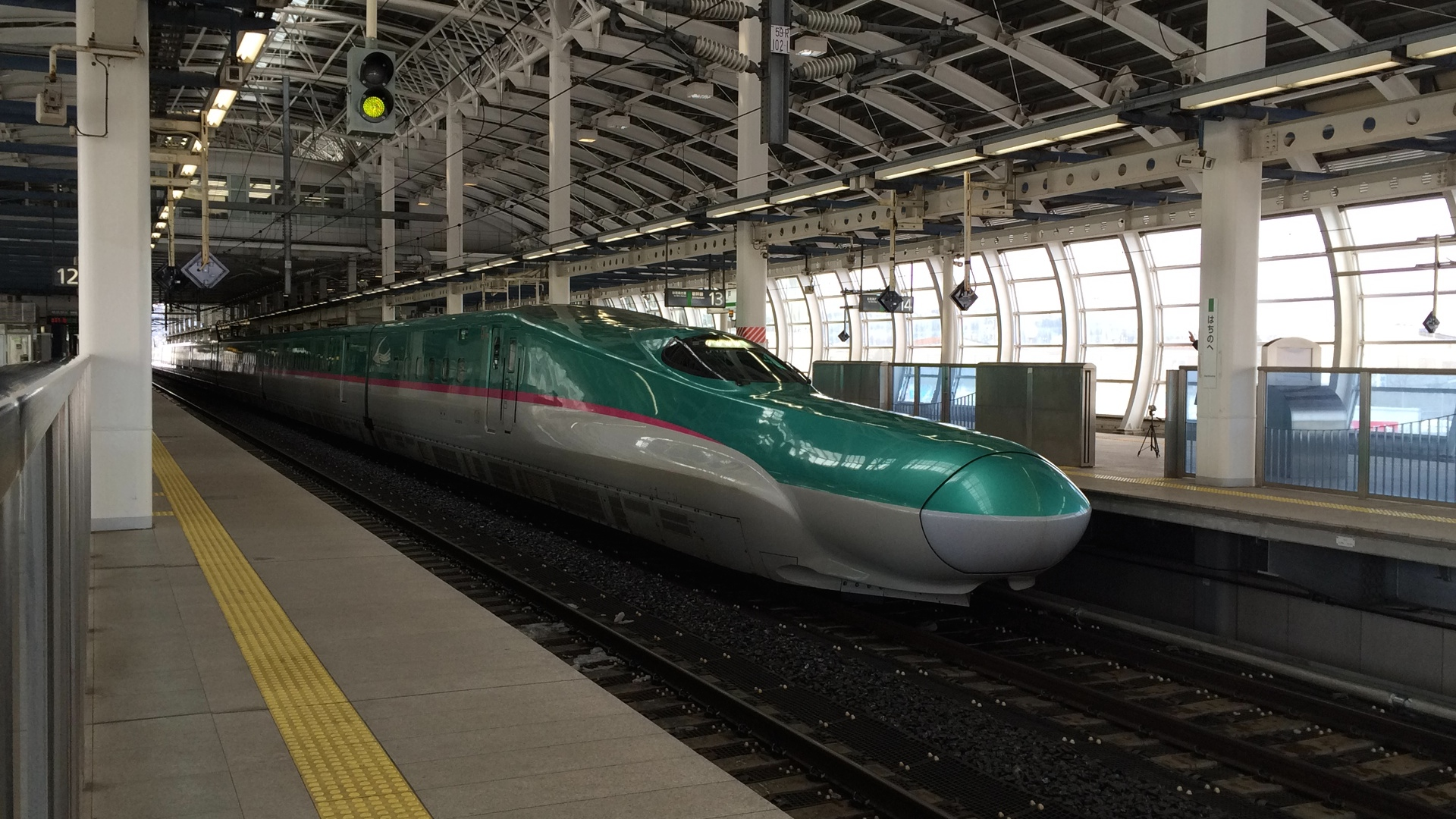 八戸駅新幹線ホーム13番線に停車中のE5系はやて